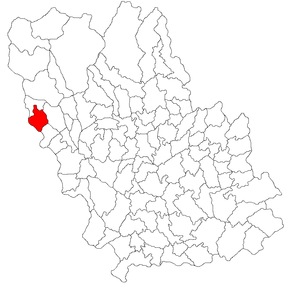 Categorie:Hărţi ale judeţului Prahova